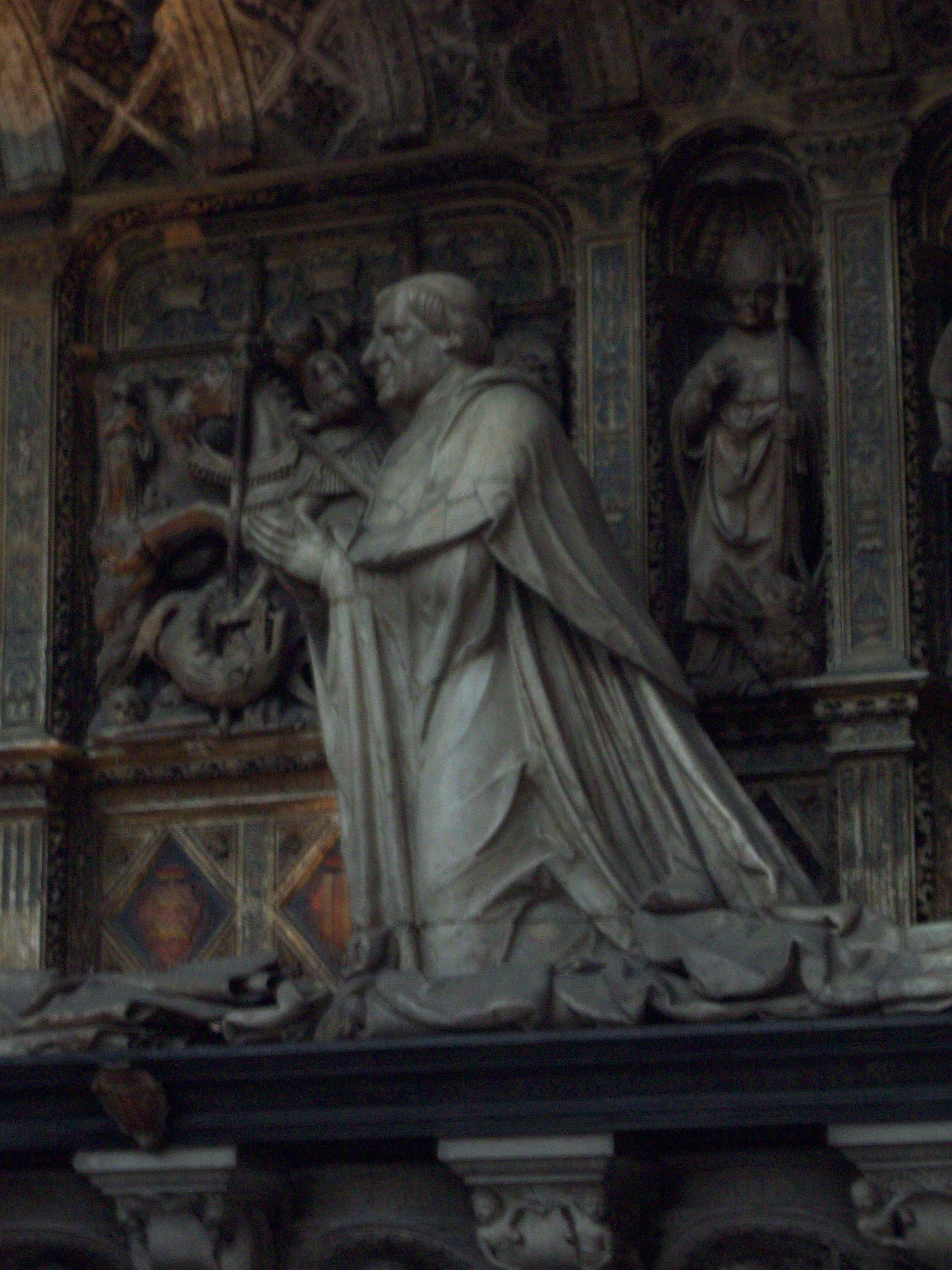 Orant de Georges II d'Amboise, sur le mausolée des cardinaux d'Amboise.